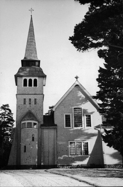 Kyrkan från väster. Före restaurering.